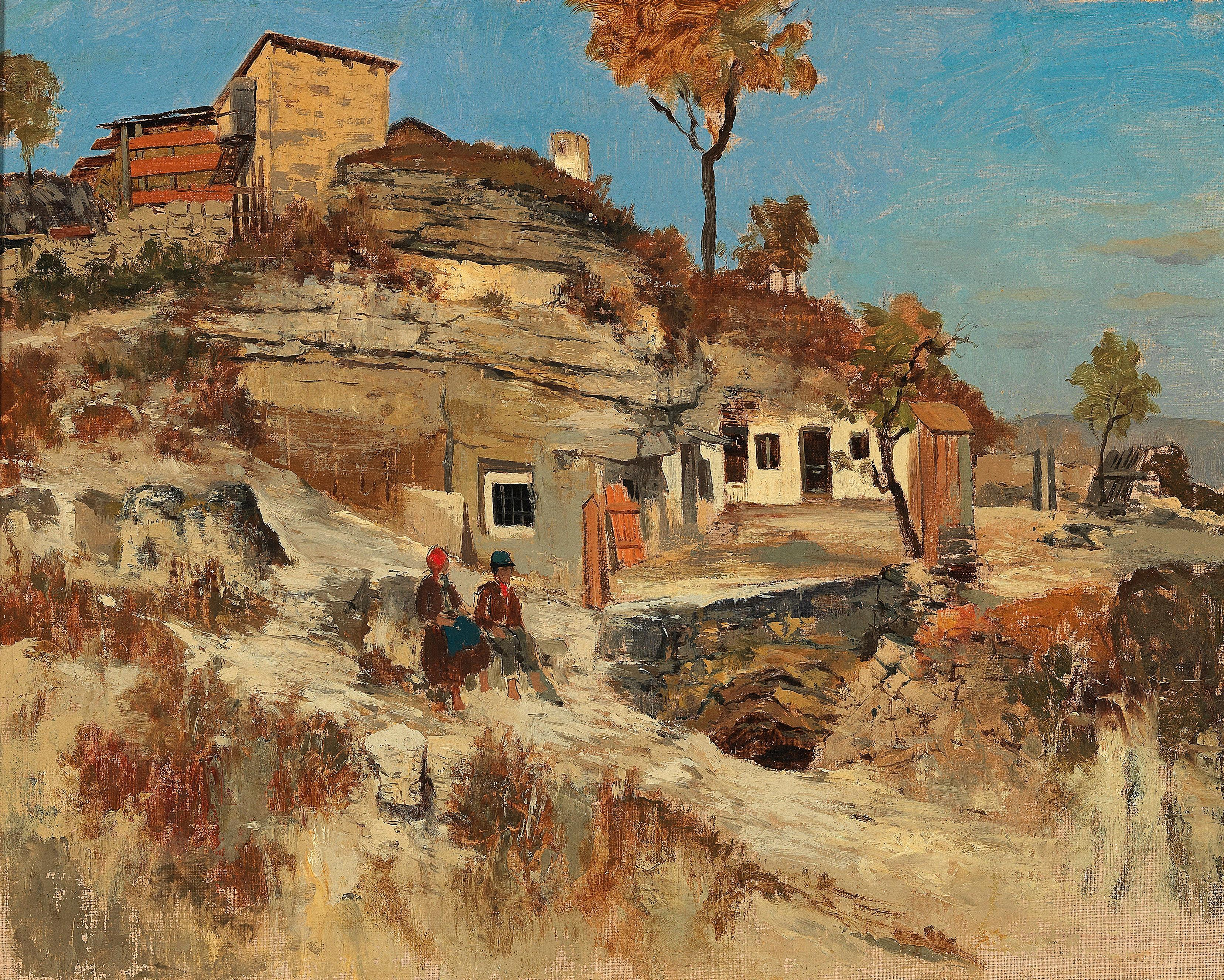 Südliche Landschaft um 1878/79, Öl auf Leinwand, 38 x 48,5 cm